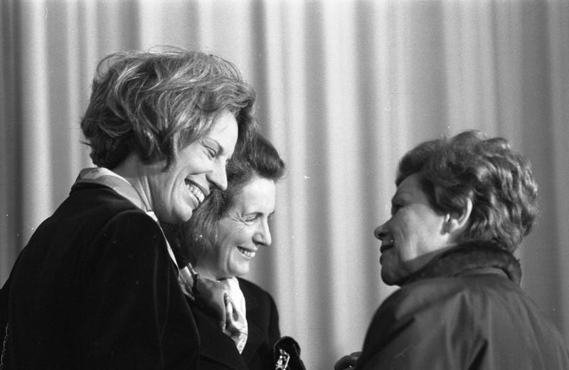 Bonner Kindertheater "Dornröschen" in der Aula des Ernst-Mortiz-Arndt-Gymnasiums (links: Mildred Scheel, Mitte: Heilwig Ahlers)